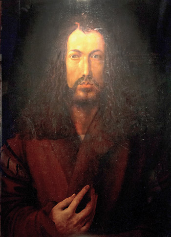 Eine von vielen Dubletten des Selbstporträts von Albrecht Dürer (lange als Fälschung angesehen). Diesem Gemälde fehlen links oben die Signatur-Buchstaben »AD« von Albrecht Dürer. Daher kann es sich nicht um eine Fälschung handeln, sondern es ist eine Dublette des Originals, die zu einer Zeit angefertigt wurde, als die Fotografie noch nicht erfunden war und das Abmalen die einzige Möglichkeit war, ein farbiges Abbild herzustellen. "Der Maler dieser Kopie ist völlig unbekannt", so Frau Dr. Kubach-Reutter im NN-Artikel: »Selbst Pelzrock-Kopie wirbelt Staub auf« vom 01.03.2012 08:00 Uhr. Untersuchungen des Germanischen Nationalmuseums in Nürnberg, darunter Röntgenaufnahmen oder Infarotbestrahlungen, haben nun auch vor wenigen Tagen ergeben, dass die Kopie, von der die Nürnberger lange glaubten, sie sei von Küfner, nicht von ihm sein kann. „Das Bild ist vor 1786 gemalt, Küfner lebte jedoch von 1760 bis 1817“, so Frau Dr. Kubach-Reutter im Dürerhaus. Das Gemälde wird seit 01.03.2012 im Dürerhaus ausgestellt, nachdem es fast zwei Jahrhunderte in der Gemälde- und Skulpturensammlung der Museen der Stadt Nürnberg mit der Nummer: Gm51 archiviert war.